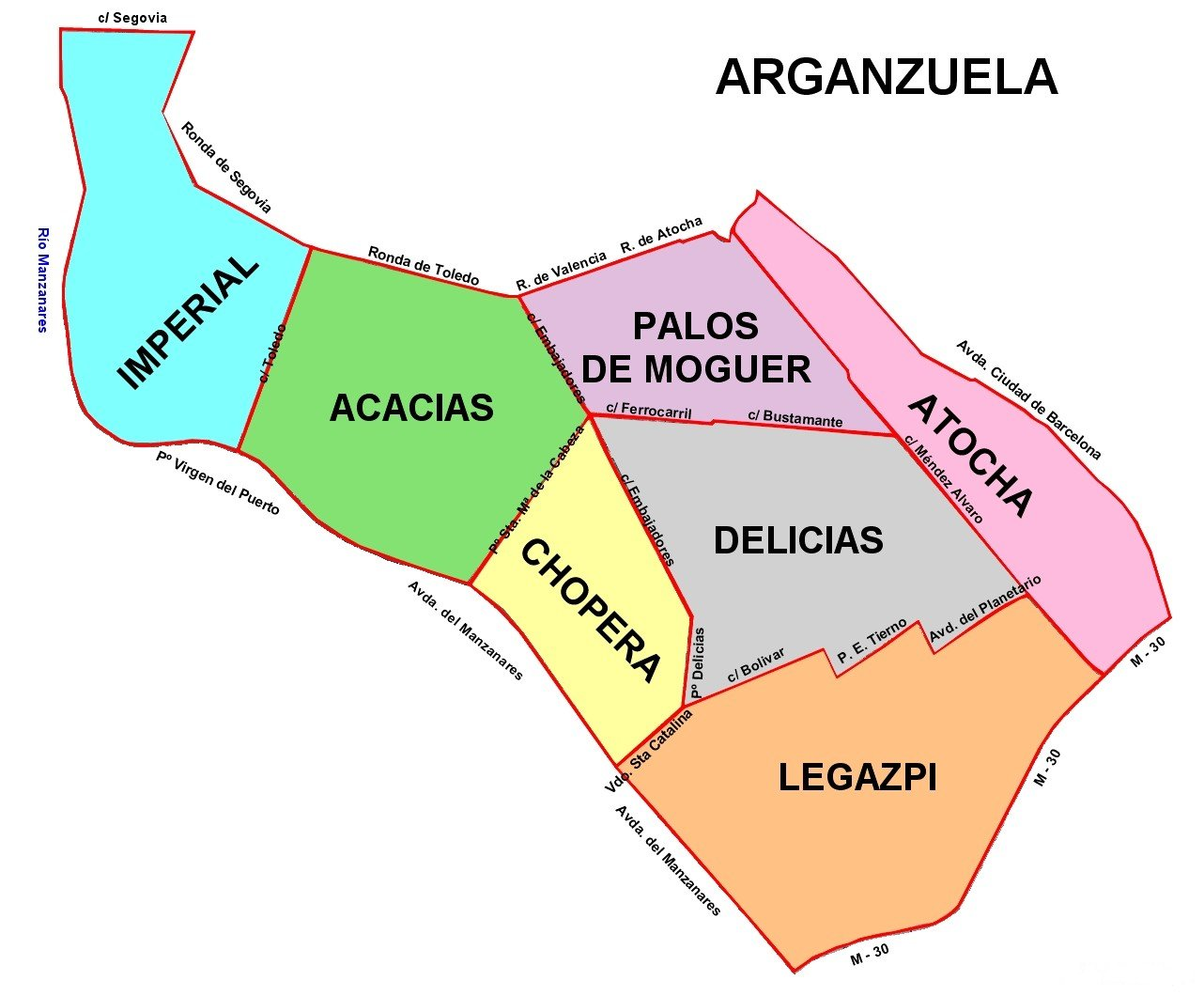 Plano del distrito de Arganzuela, en Madrid (España).